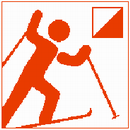 סמל ניווט סקי